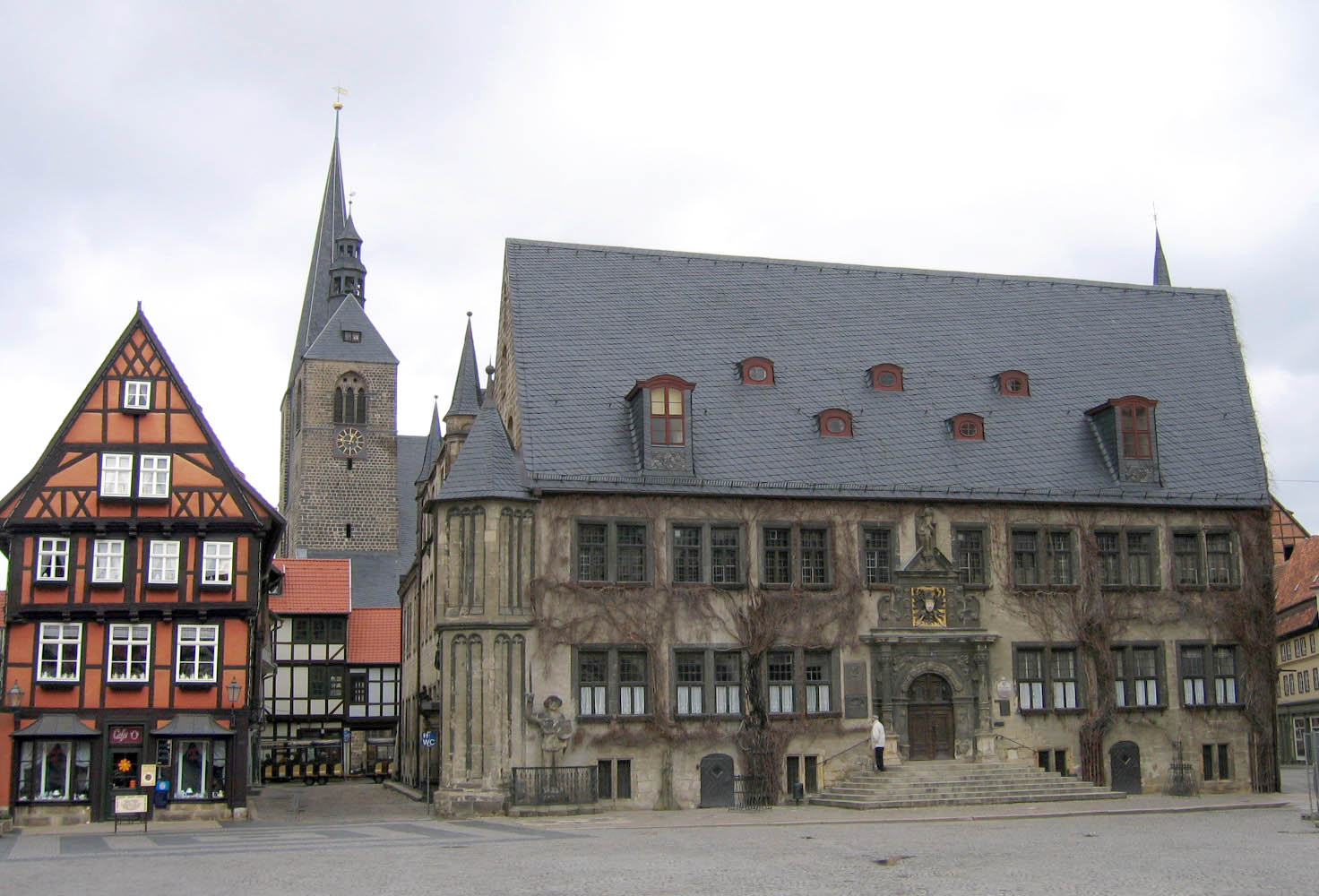 Rathaus von Quedlinburg